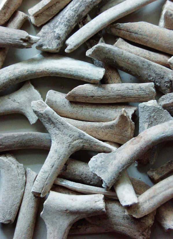 Oeger Höhle in Hagen-Hohenlimburg. Bruchstücke von Rentiergeweihen aus der Oeger Höhle. Alter rund 15.000 und 31.000 Jahre vor heute.